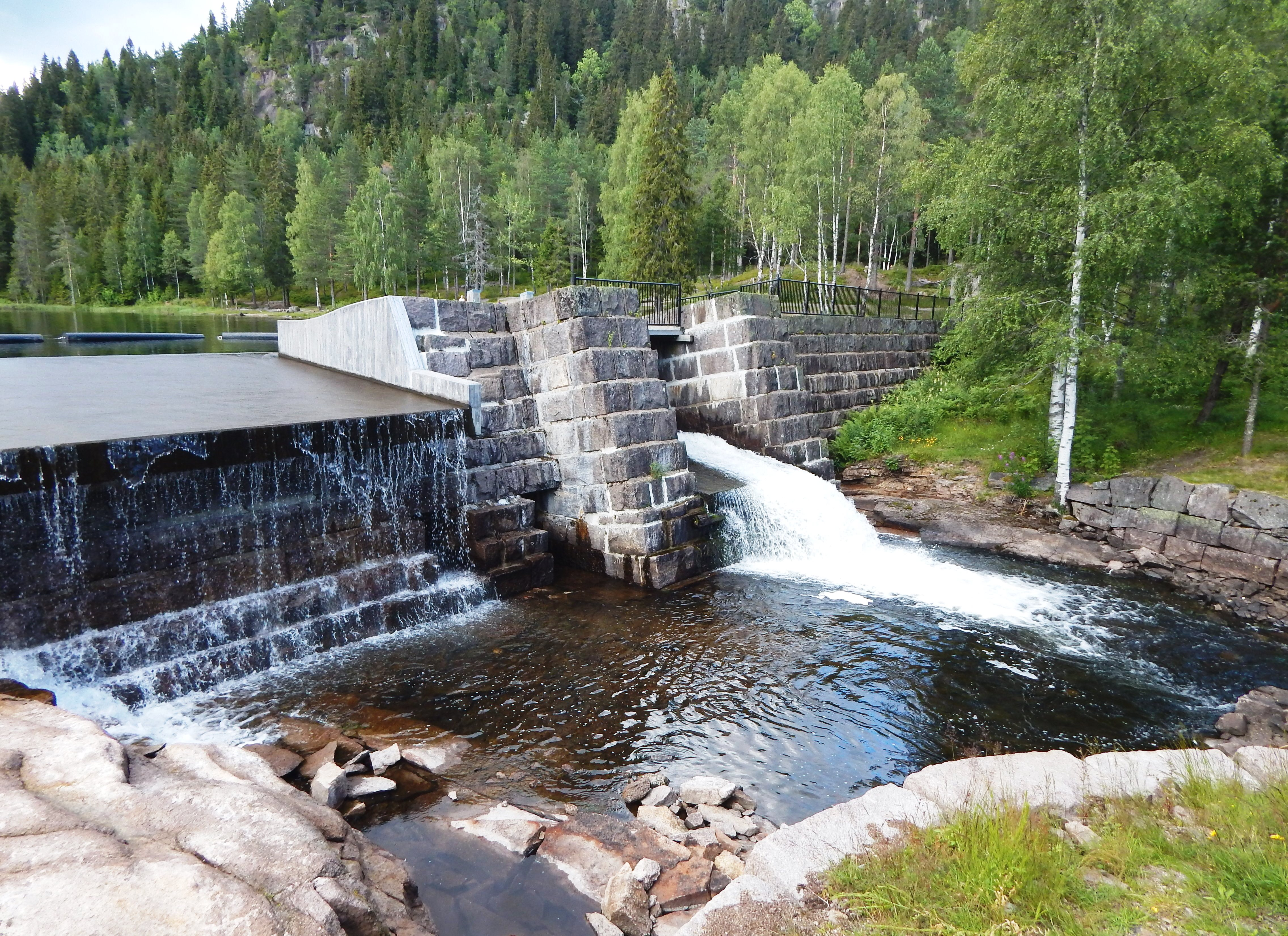 Øyungsdammen